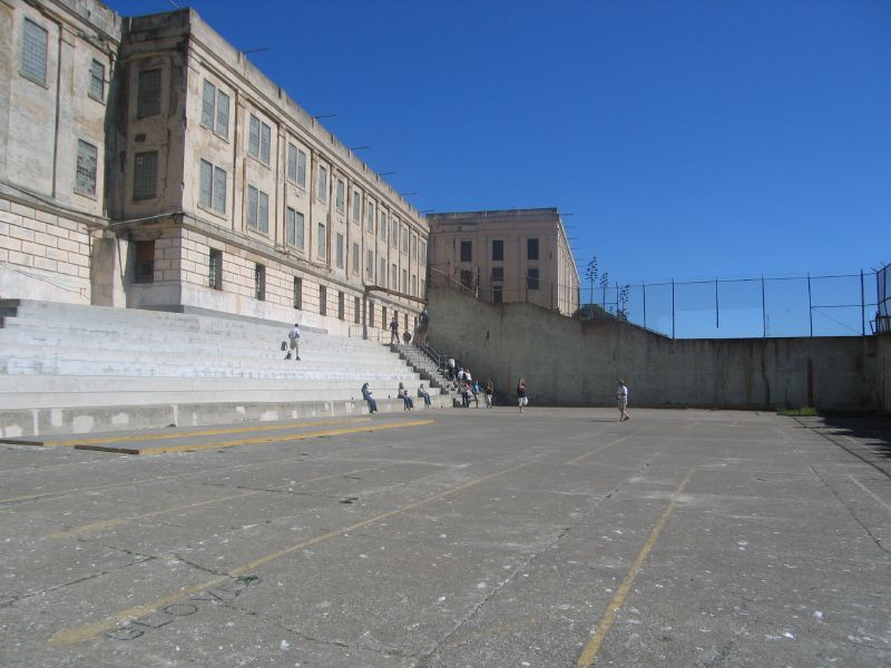 Alcatraz, San Francisco, USA